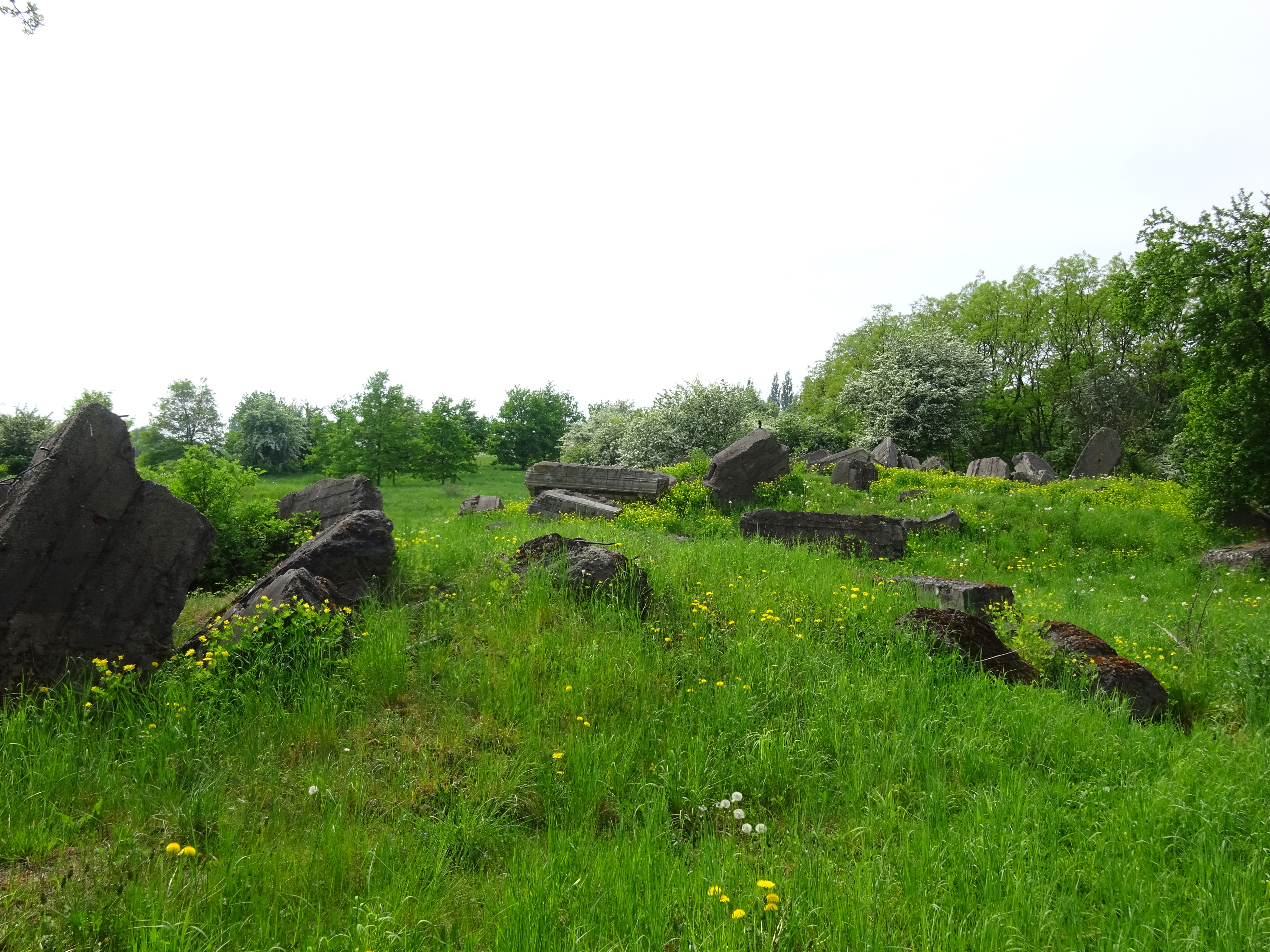 Ruiny domu przedpogrzebowego na Podgórskim cmentarzu żydowskim nowym w Krakowie przy ul. Abrahama 3.